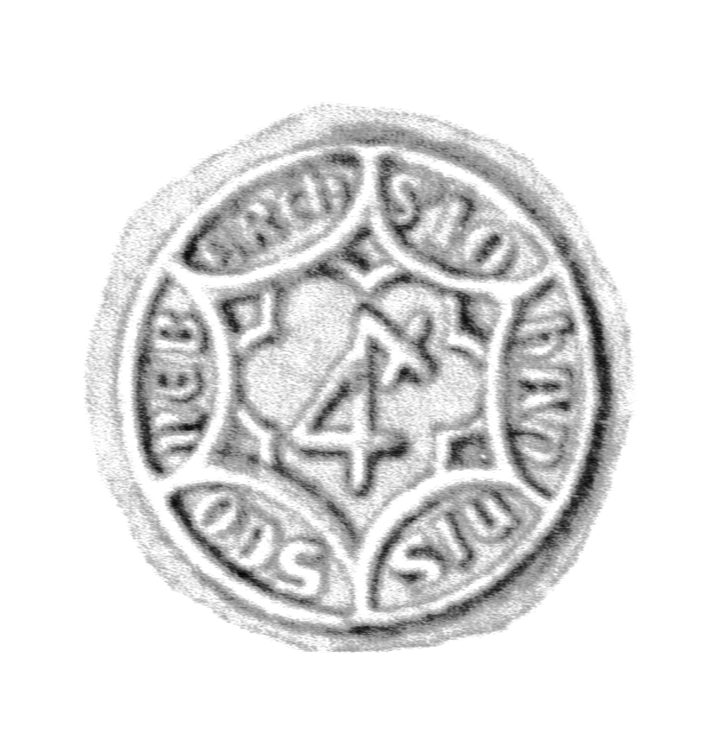 Siegel des Ratsmannes Johan(n) Schonenberg (Schonenberch) . Das Siegel stammt aus der Zeit um 1411. Siehe Emil Ferdinand Fehling: Lübeckische Ratslinie, Nr. 451 (Johann Schonenberg).